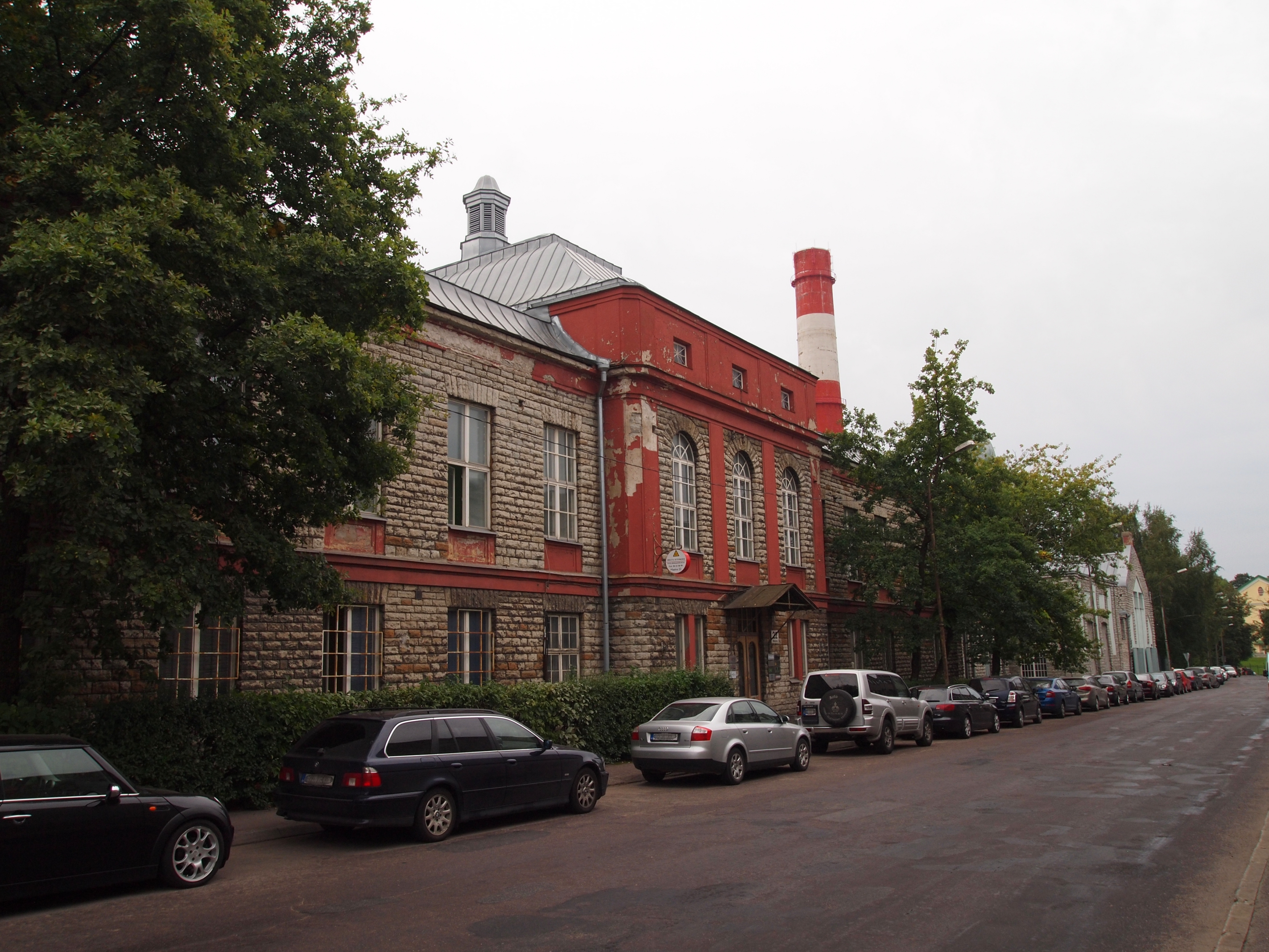 Tselluloosi- ja paberivabriku peakontor Masina tänaval.